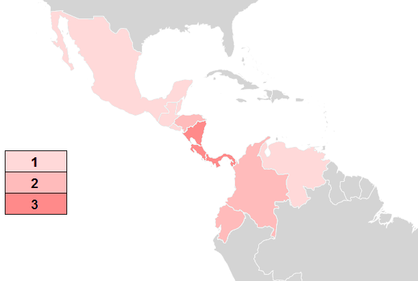 Basiliscus distribution